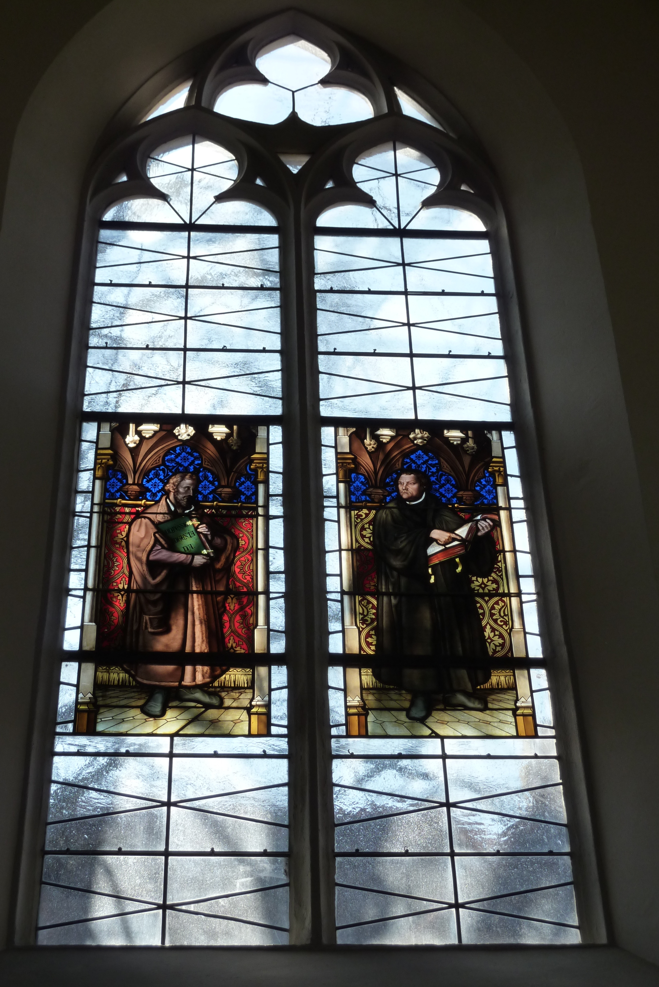 Evangelische Katharinenkirche in Dillingen an der Donau, Glasfenster mit Darstellung Martin Luthers und Philipp Melanchthons